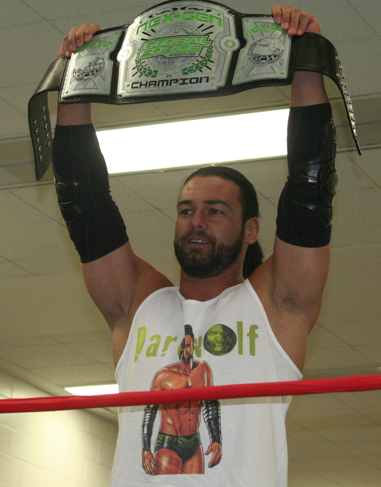 Le catcheur Justin Gabriel avec la ceinture de champion NEXGEN de la Global Force Wrestling.